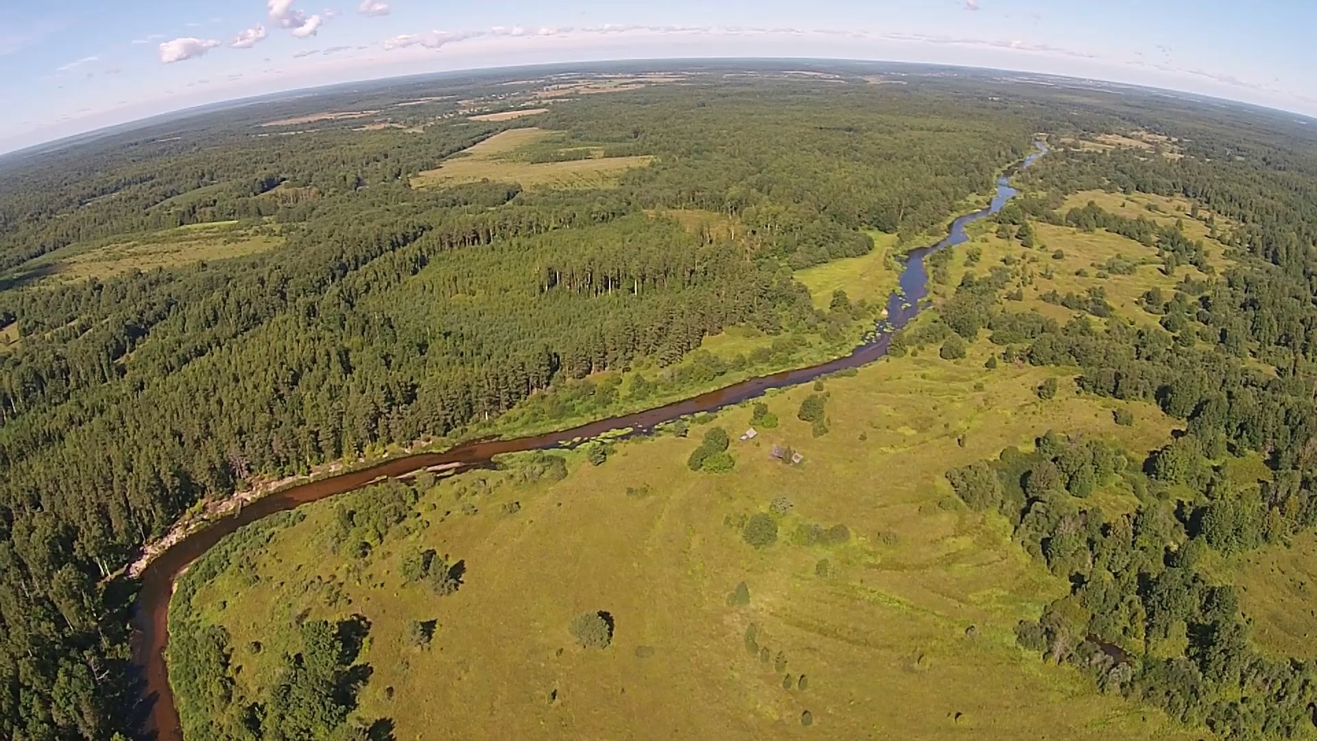 Река Медведица (Тверская область)